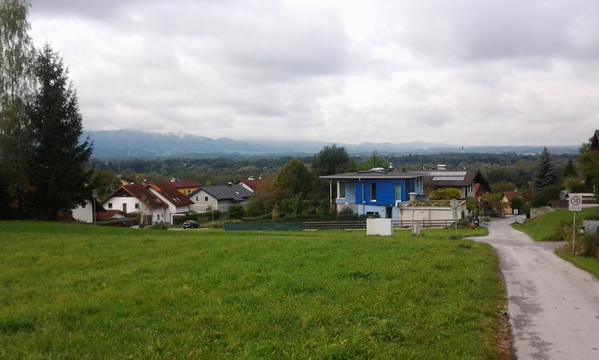 Teil der Kirchfeldsiedlung in der Gemeinde Bergheim im Norden des Landes Salzburg. Während der Zeit des Nationalsozialismus befand sich an ihrer Stelle ein Arbeitslager des Reichsarbeitsdienstes und nach Ende des Zweiten Weltkriegs bis Mitte der 1950er Jahre ein Flüchtlingslager vorzugsweise für Donauschwaben. Das Gelände liegt im Südwesten der Gemeinde am Fuß des Plainbergs.